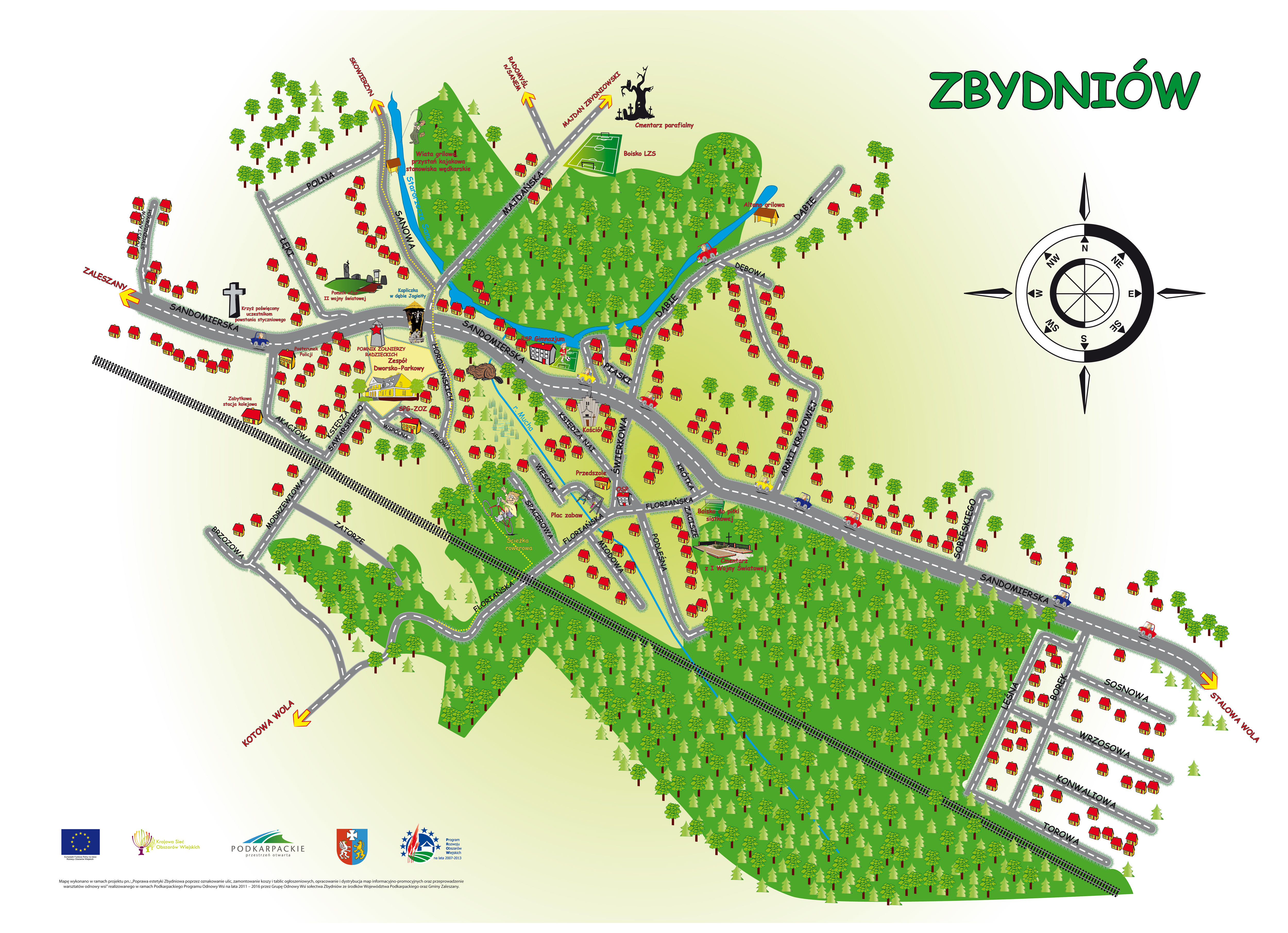 Mapa ulic w miejscowości Zbydniów